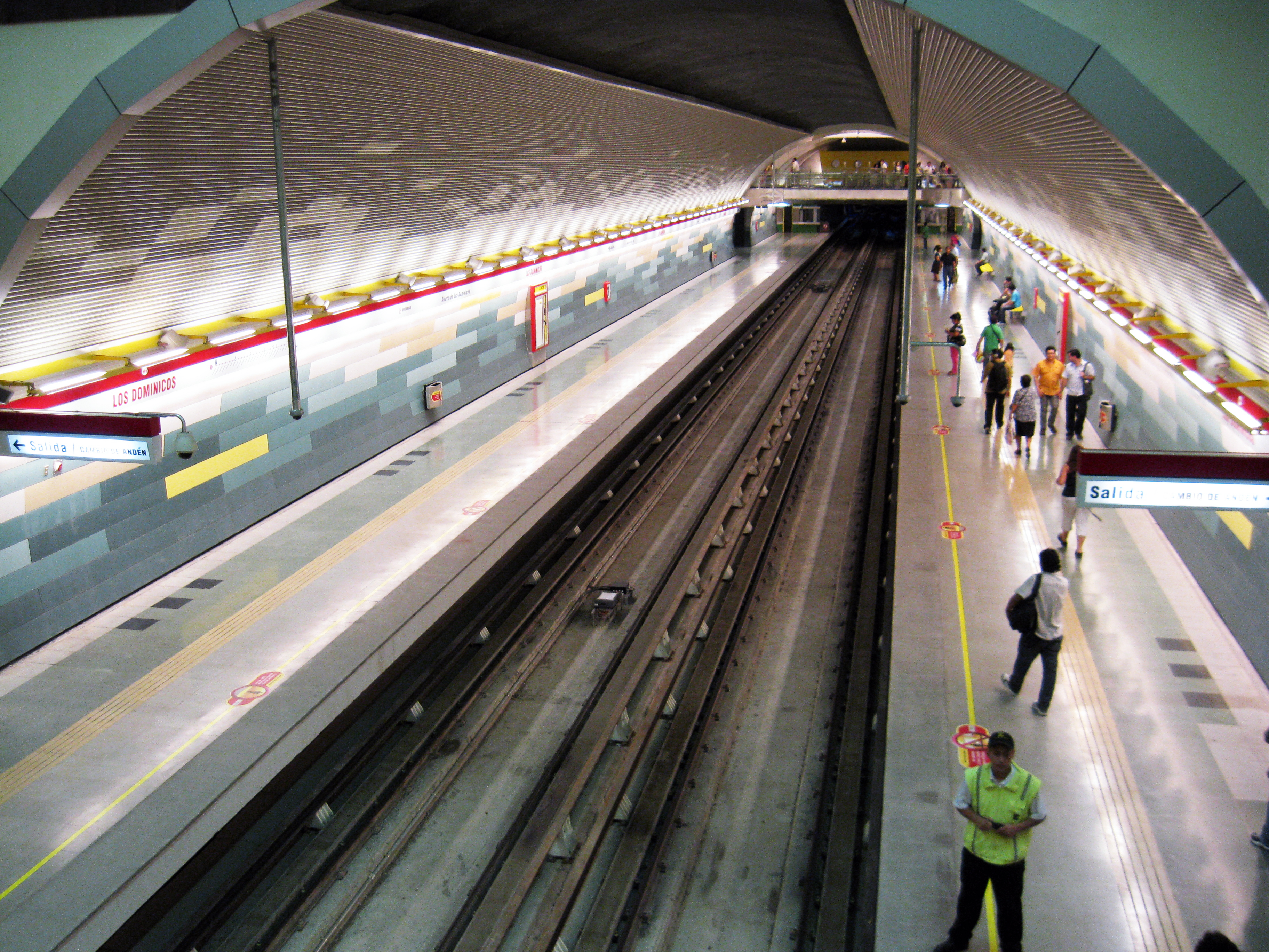 Estación Los Domínicos, Metro de Santiago